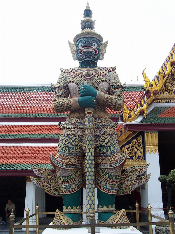 Bangkok Yaksha Heykeli.